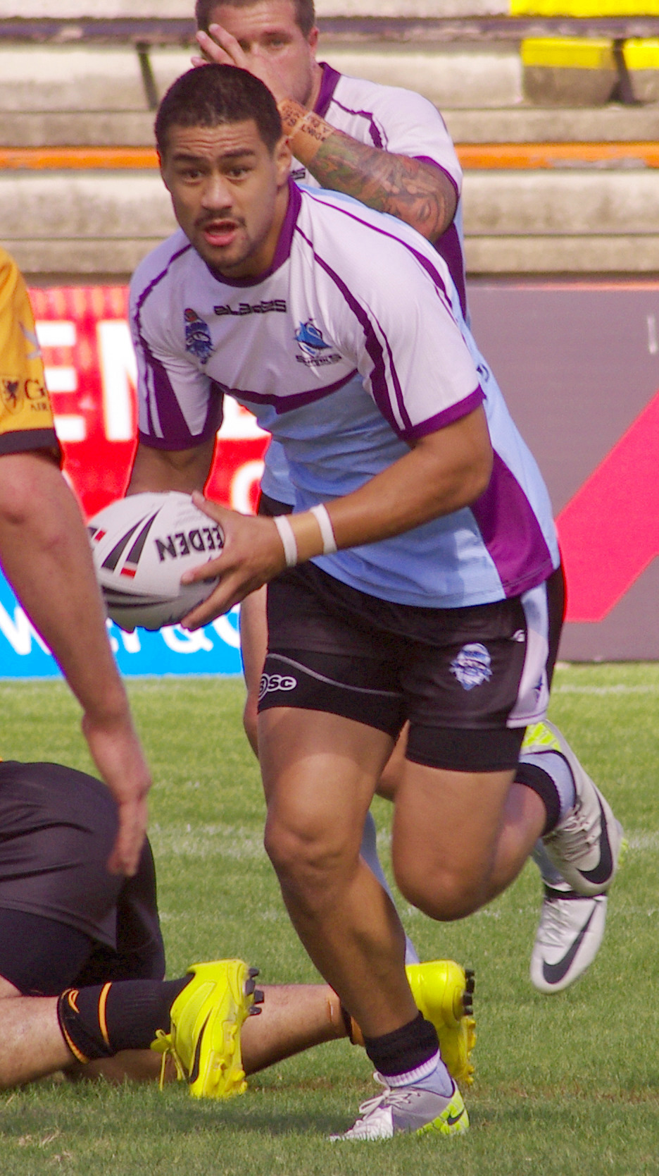 MATTHEW WRIGHT